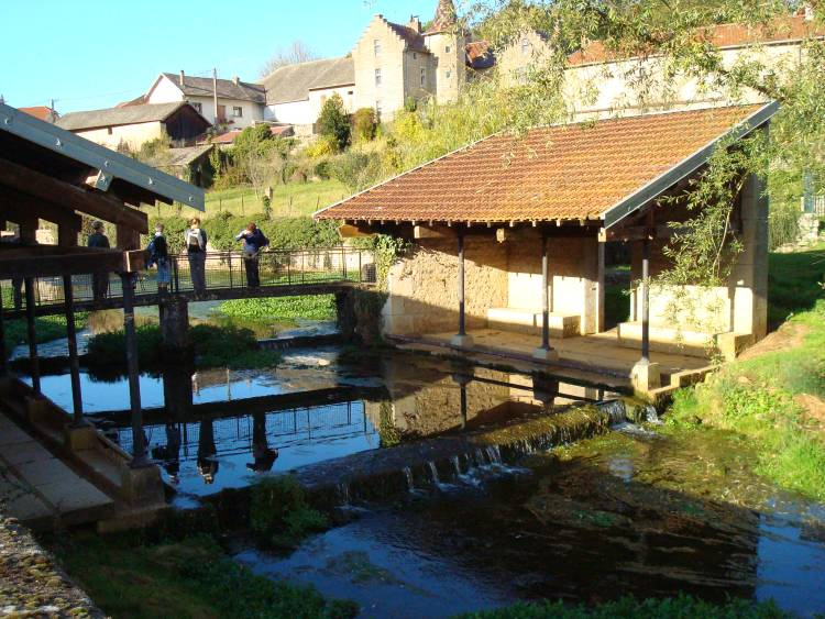 Lavoir sur le ruisseau de Filain (Haute-Saône)